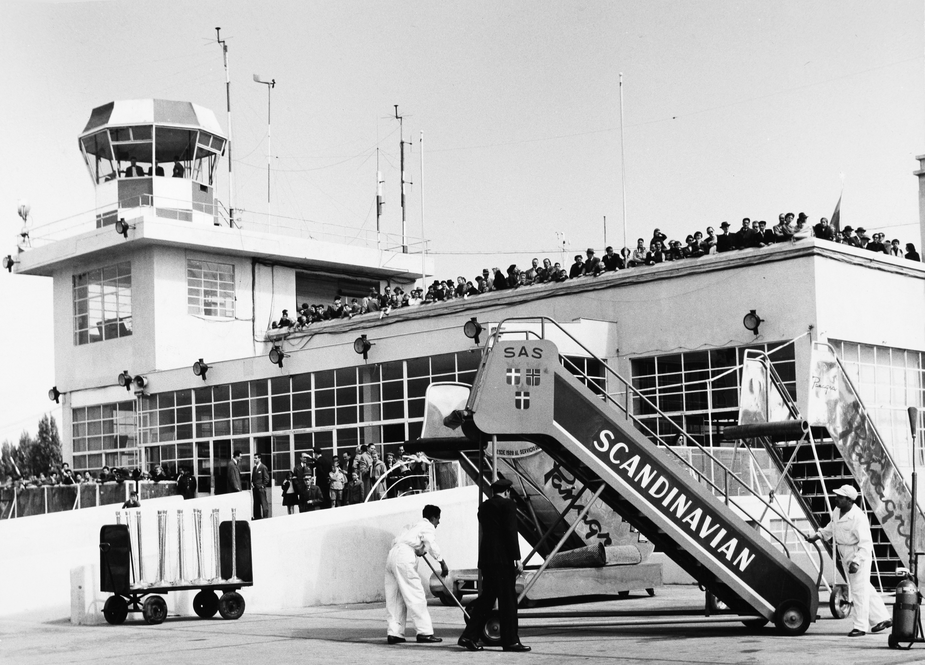 Arturo Merino Benitez Airport SCL, Santiago de Chile, Chile